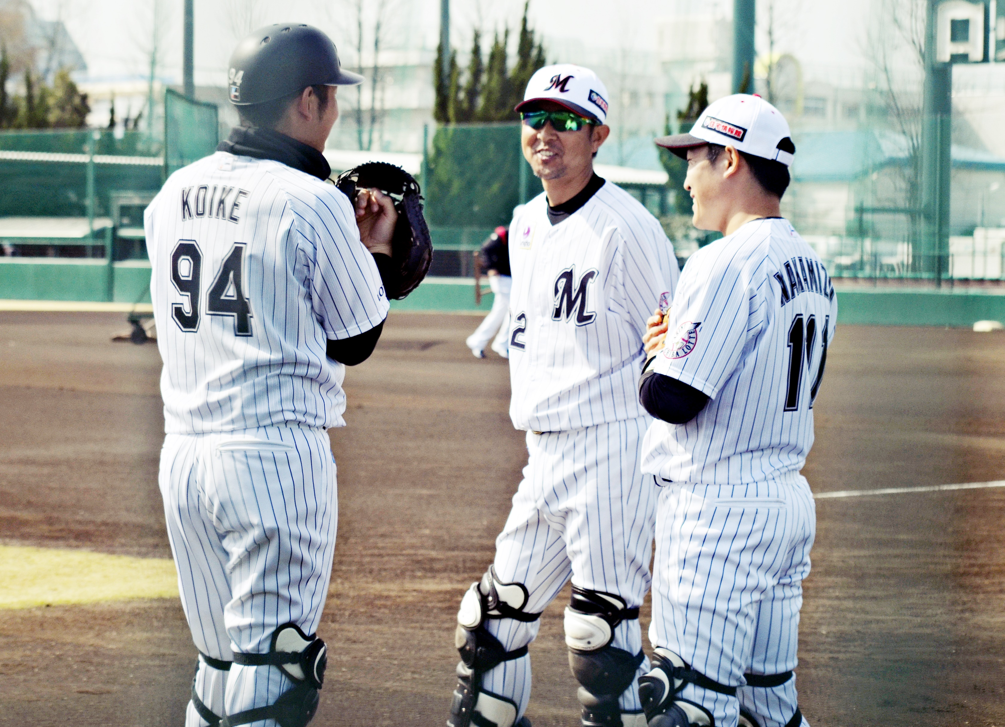 千葉ロッテマリーンズの小池翔大さん、柳沼強さん、中溝雄也さん